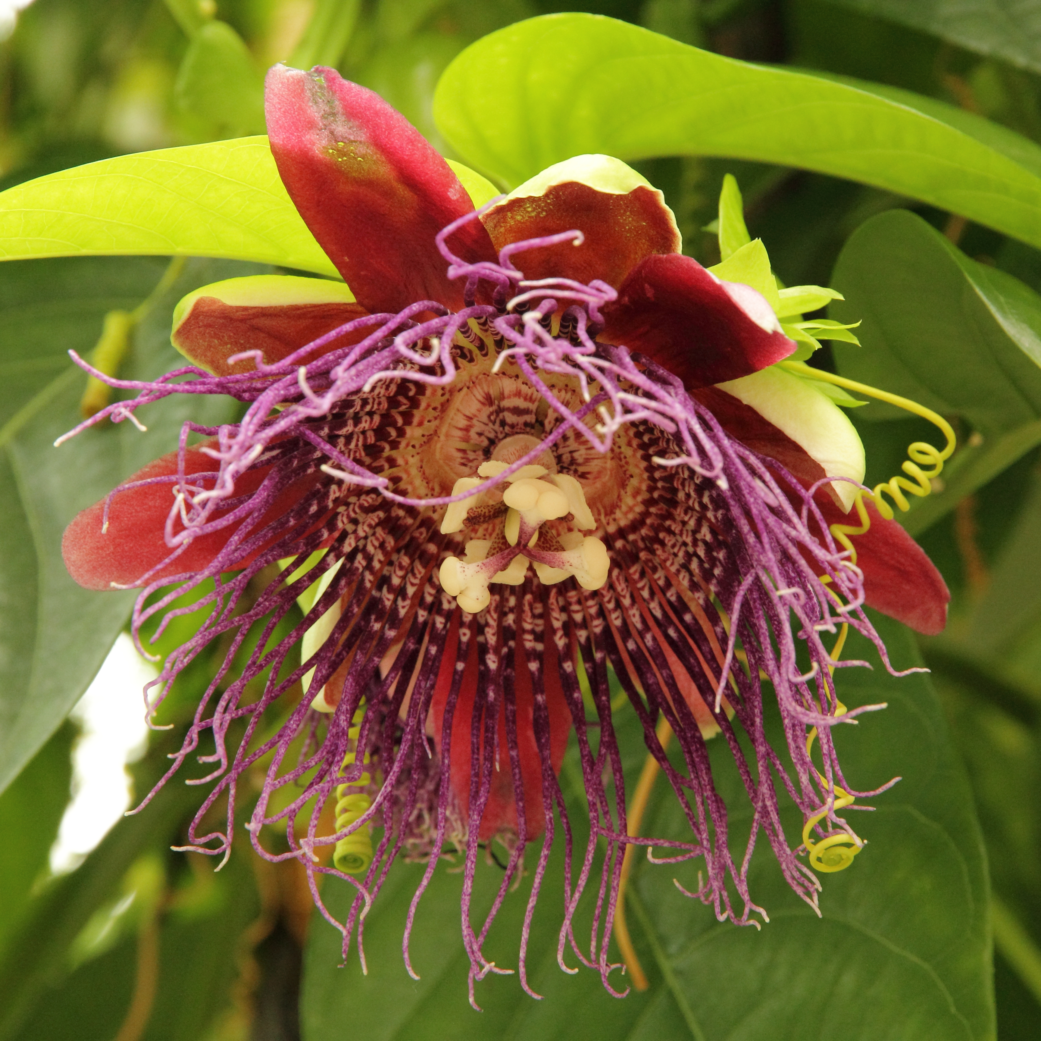 Passiflora quadrangularis i Bergianska trädgården.